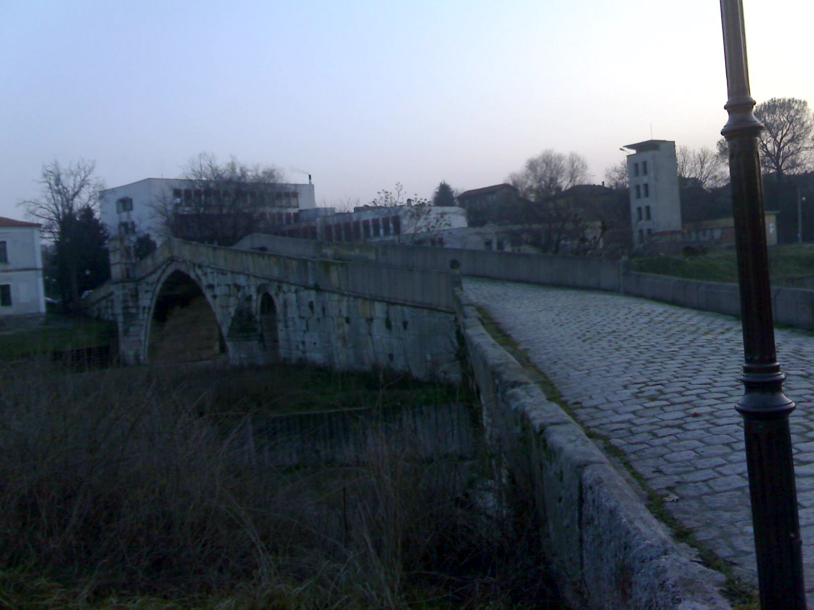 Гърбавият мост в гр. Харманли